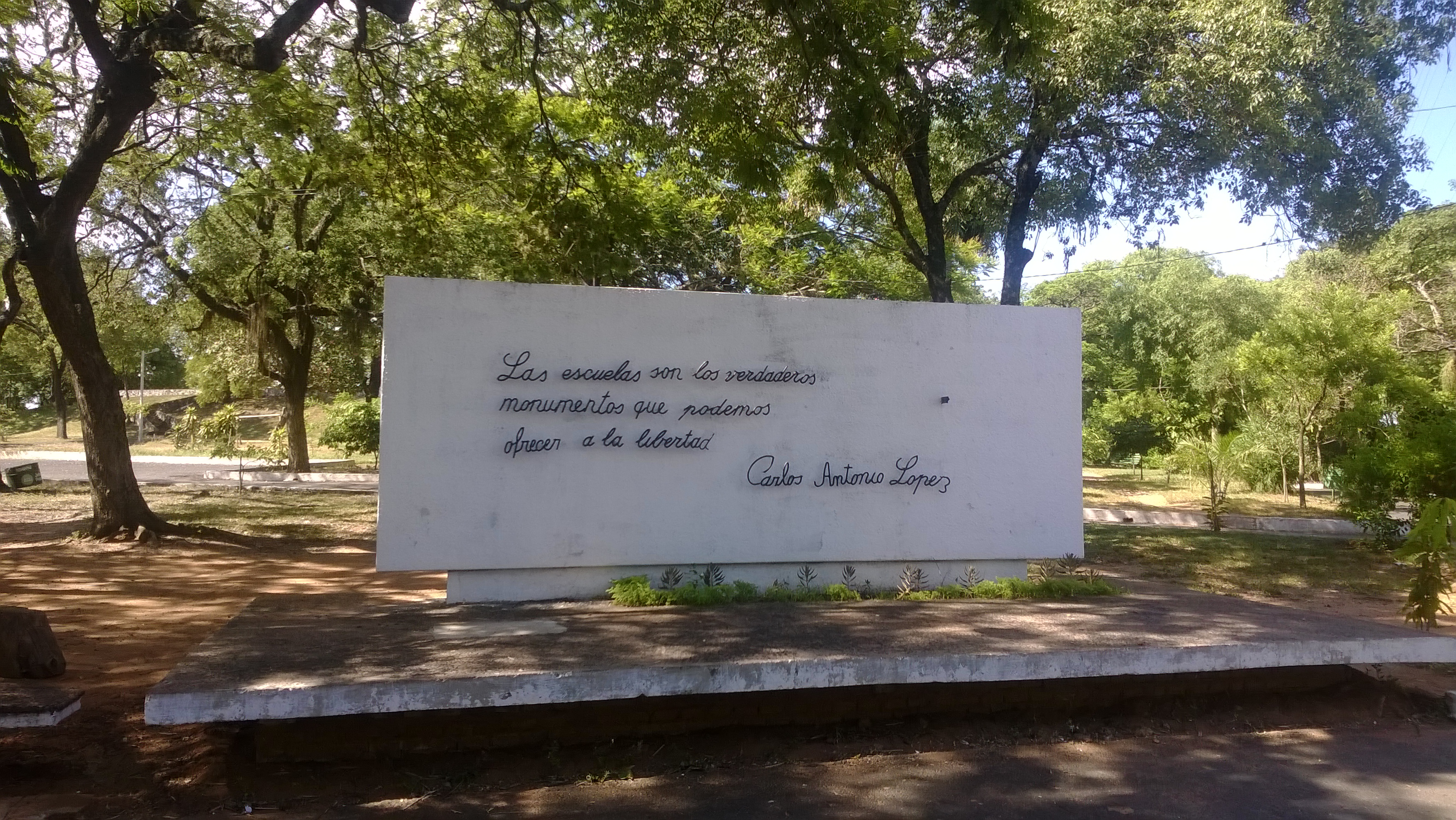 Mural en el acceso principal